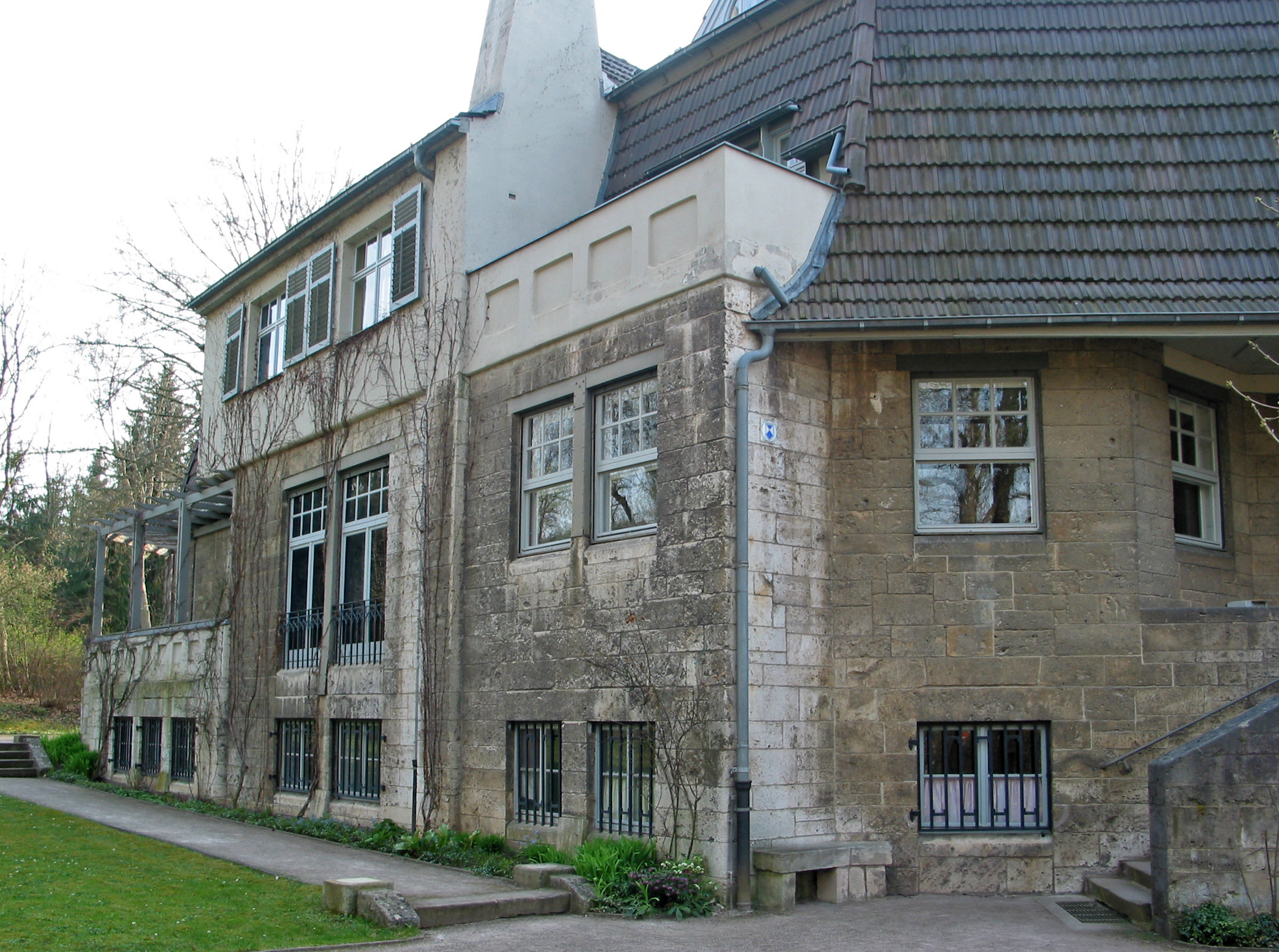 Ostansicht von Henry van de Veldes Wohnhaus "Haus Hohe Pappeln" in Weimar.